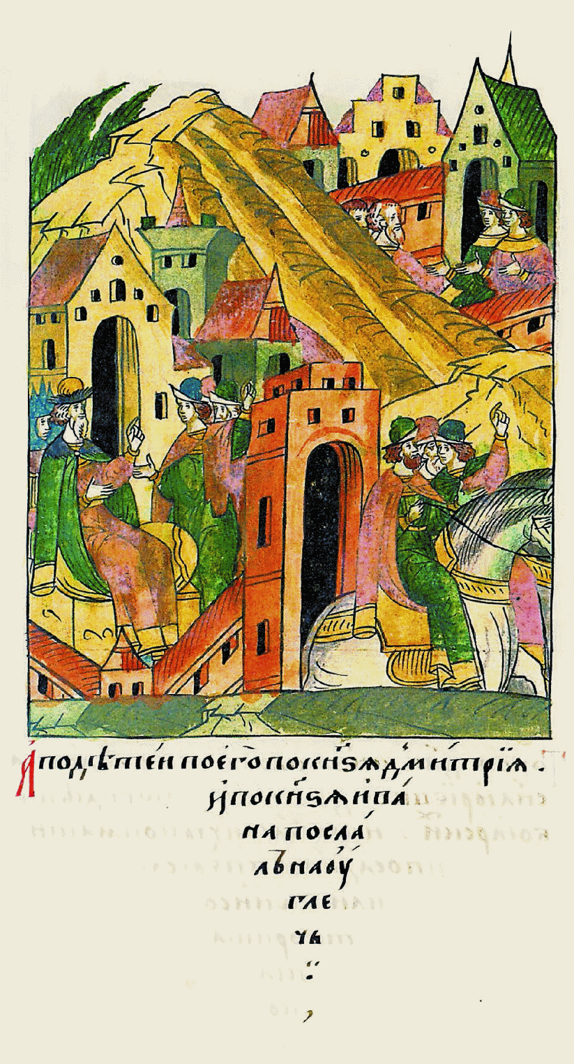 и за его детьми кня- зем Дмитрием и кня- зем Иваном послал в Углич